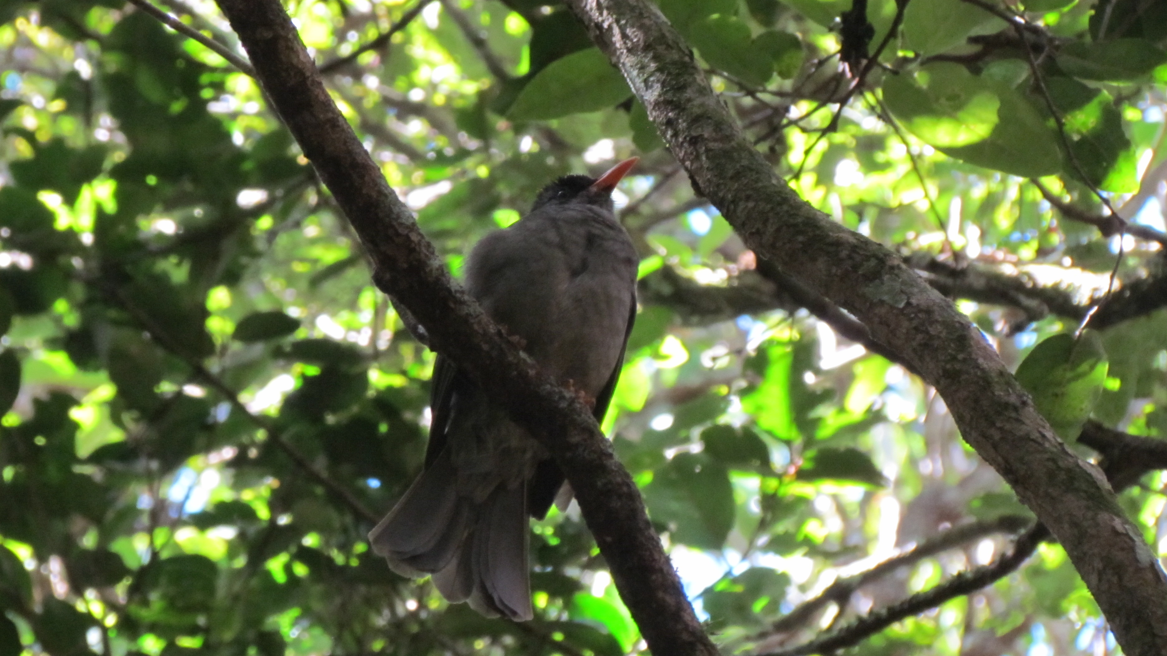 Mauritius Bulbul